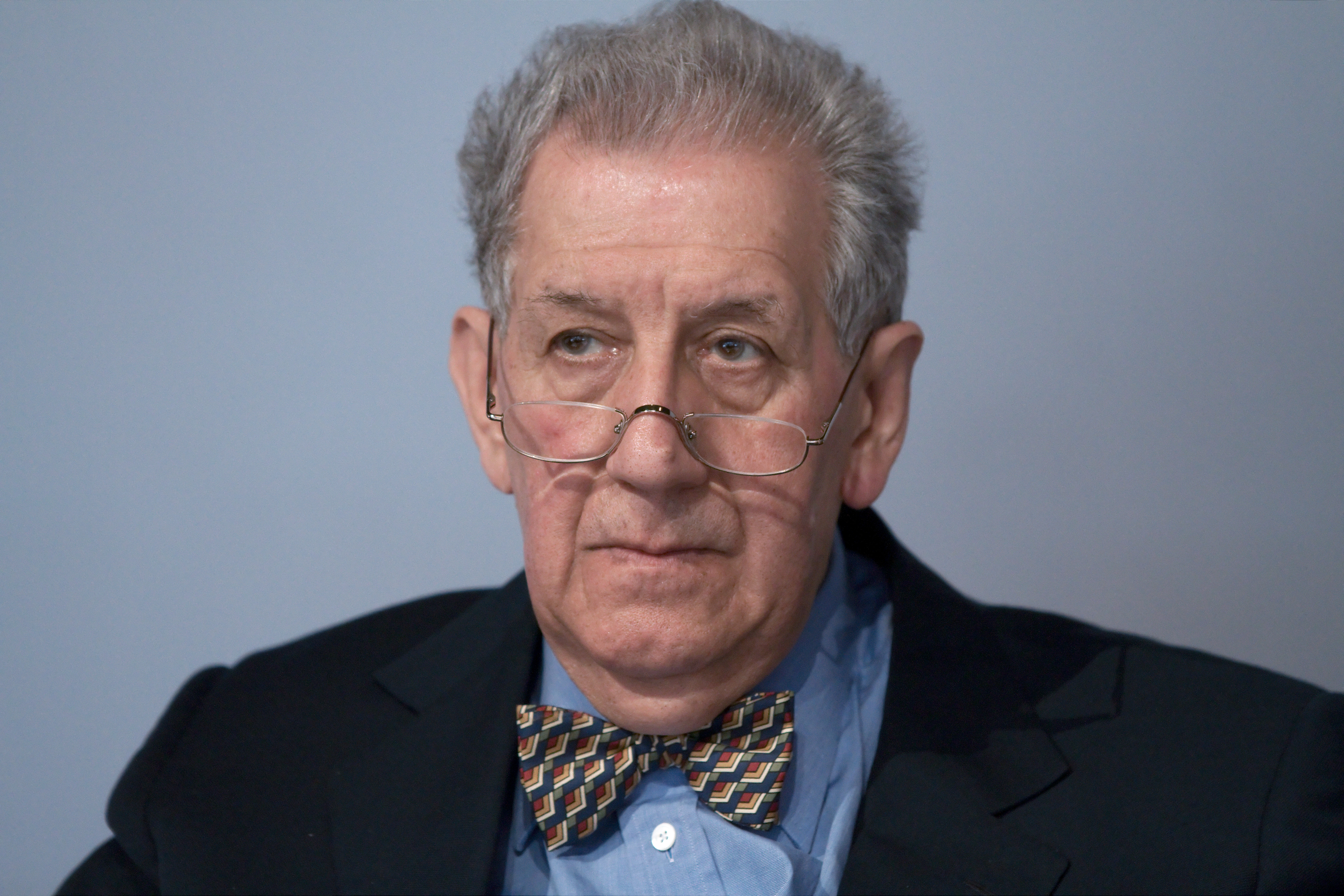 Doğan Hızlan au Salon du livre de Paris lors du débat sur La littérature turque contemporaine et la tradition de la critique.